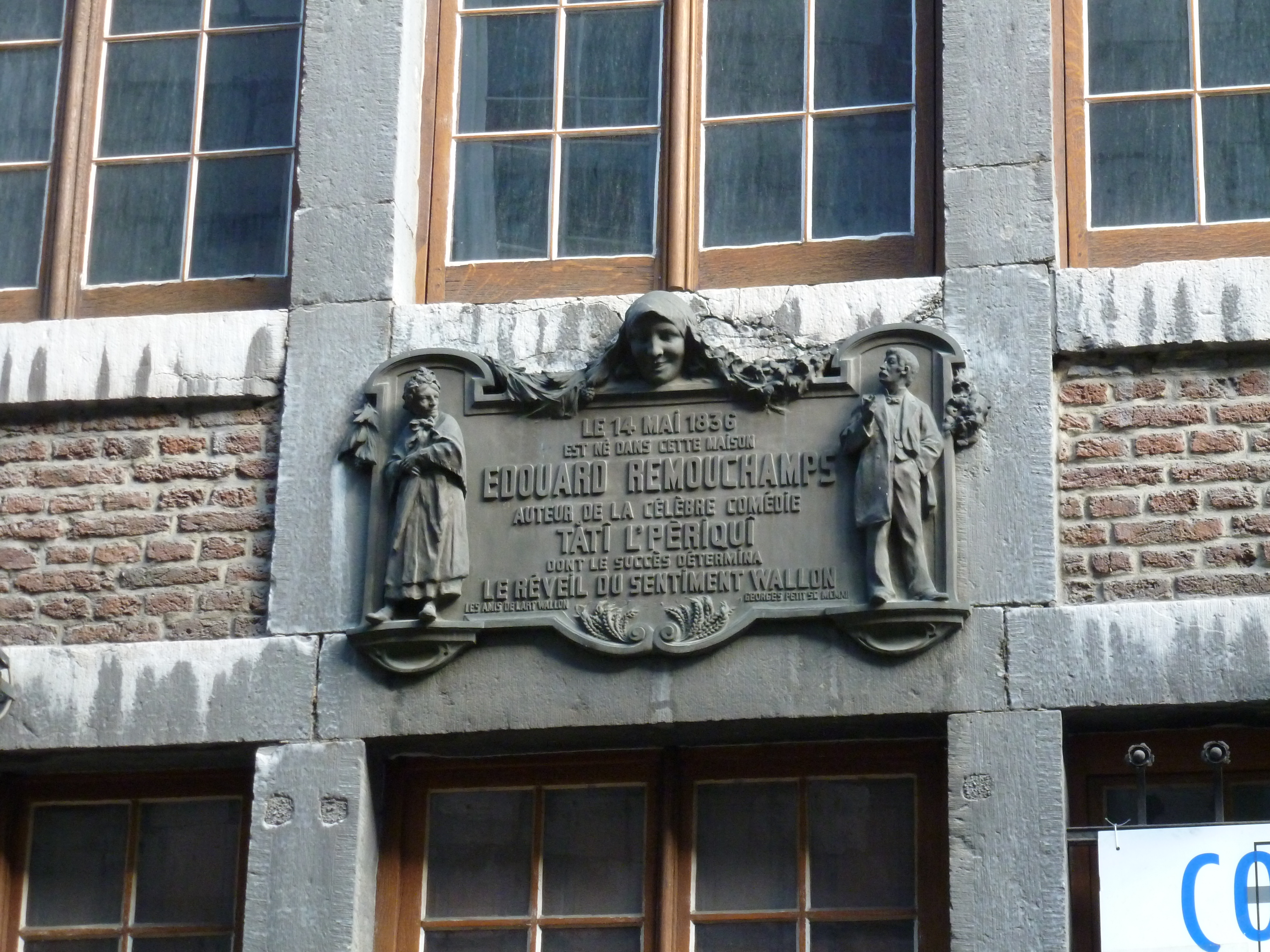 maison ancienne - détail